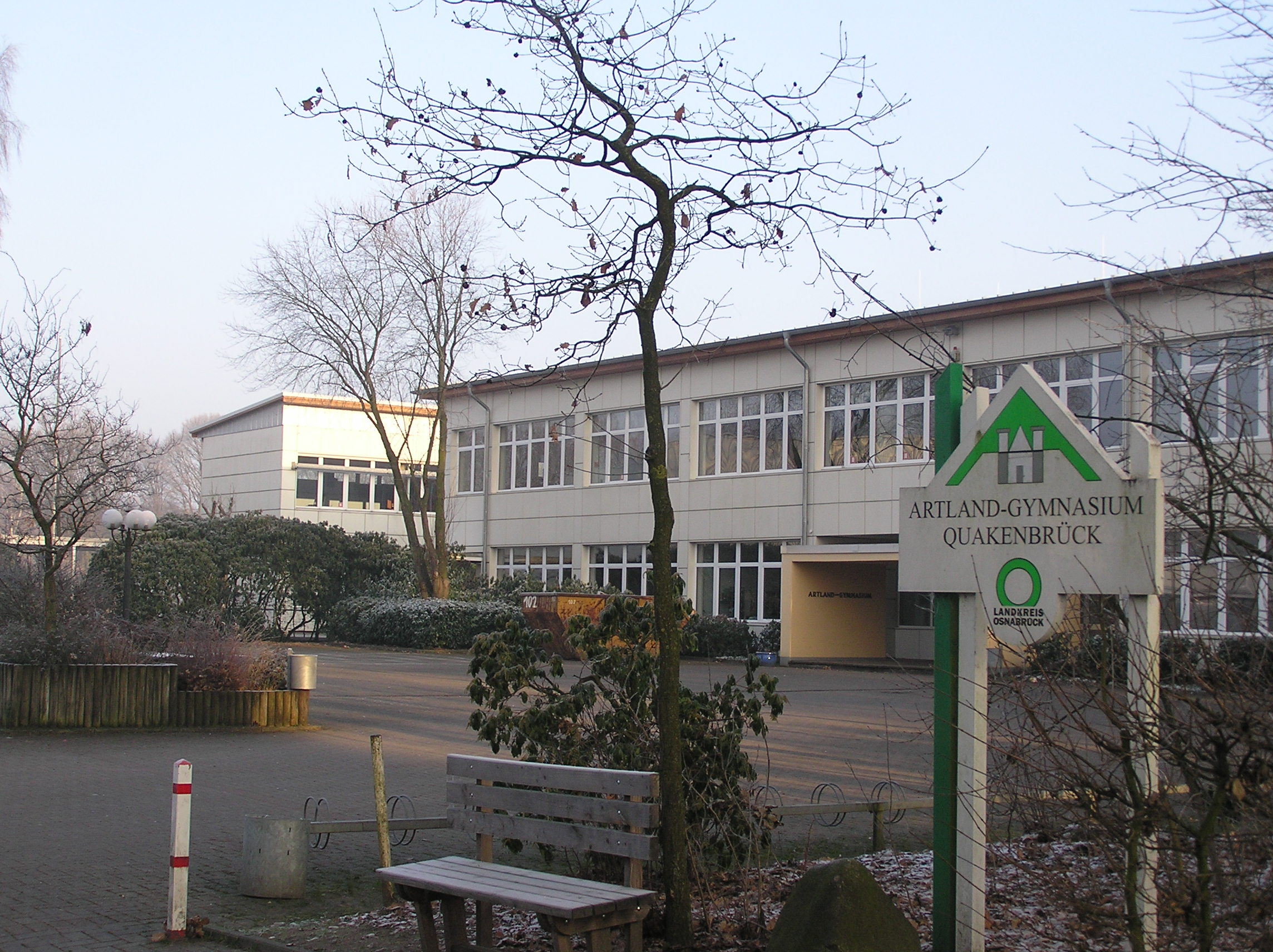 Artland-Gymnasium in Quakenbrück